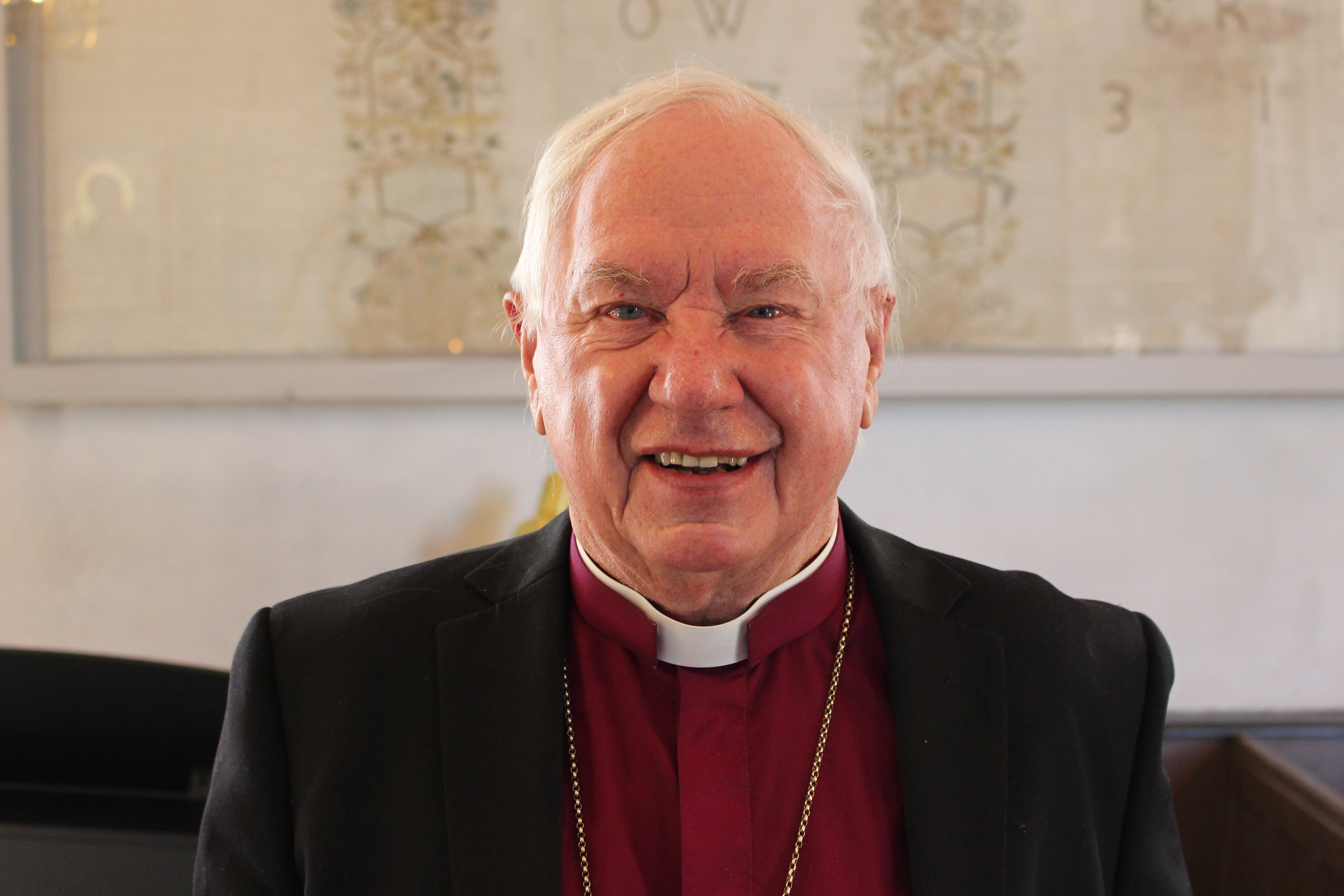 Biskop Biörn Fjärstedt i Östuna kyrka.